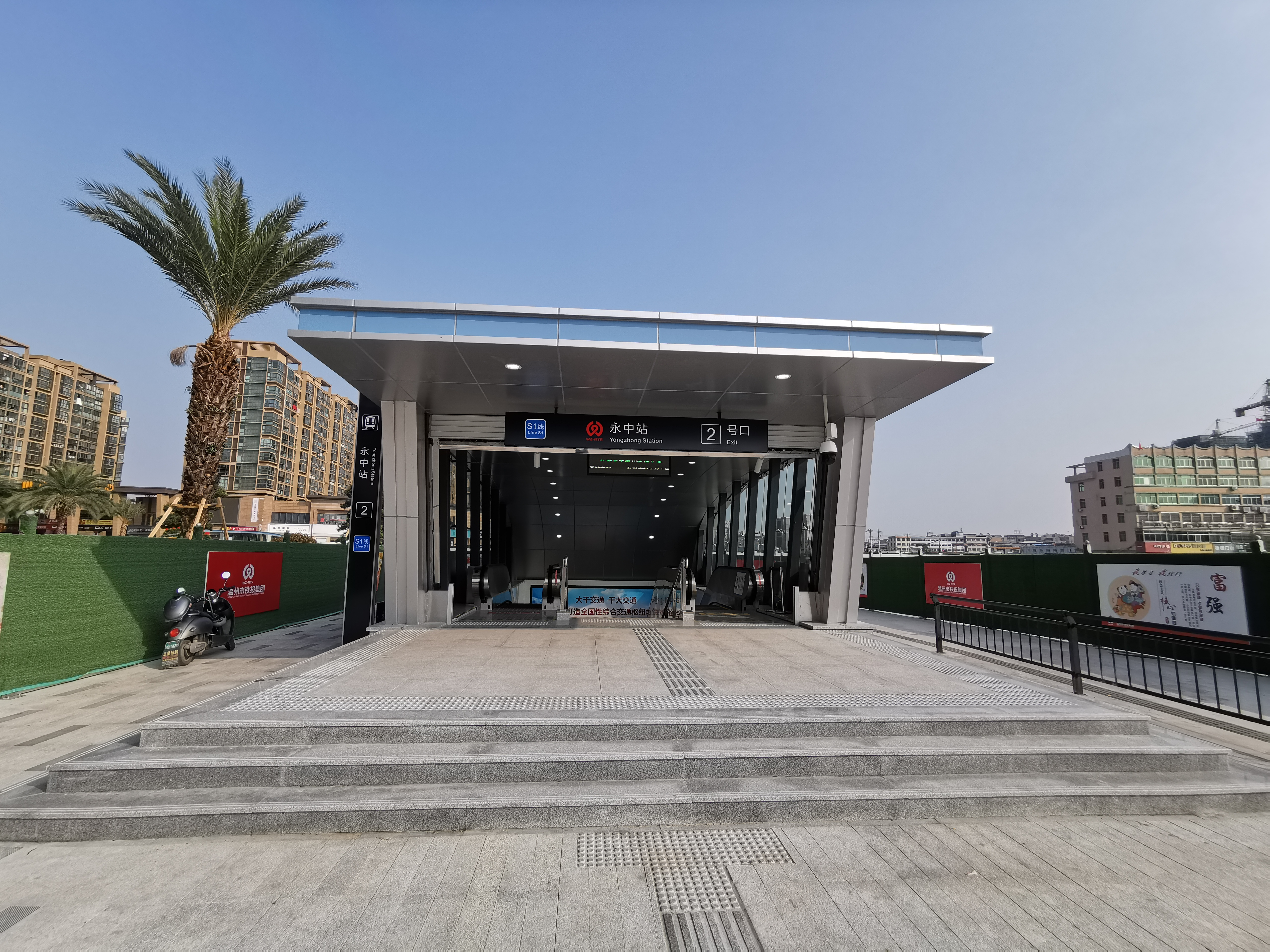 中文（中国大陆）: 温州轨道交通S1线，永中车站（2号出入口）